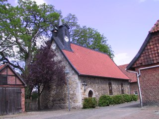 Kapelle in Wasbüttel